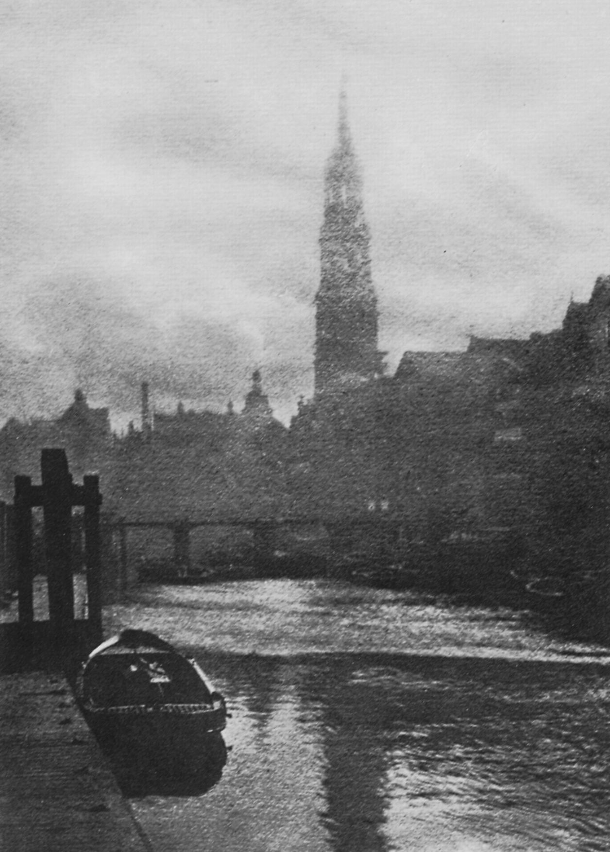 Hugo Henneberg: Katharinenfleet. Gummidruck, cirka 1900. Das Bild zeigt den ehemaligen Katharinenfleet in Hamburg.